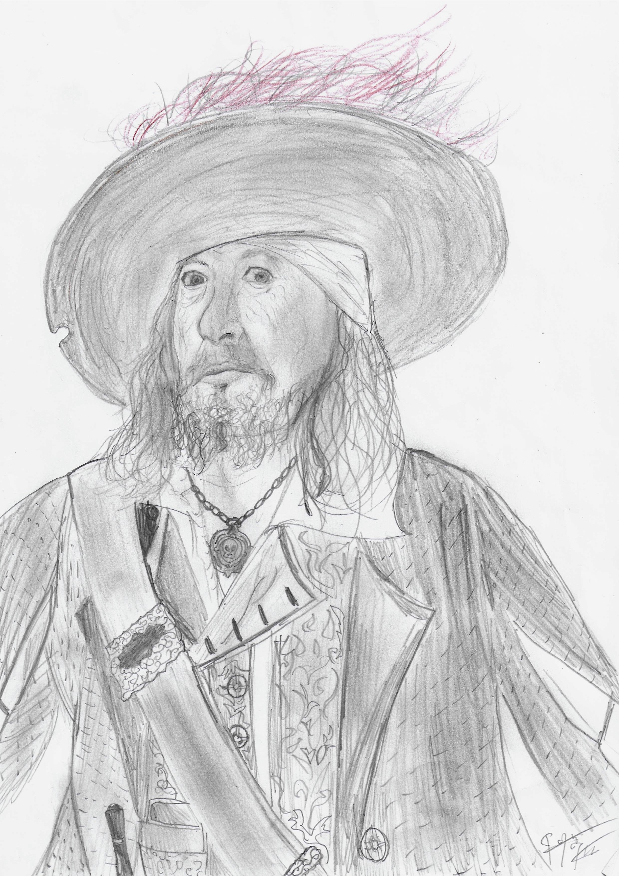 Vue d'artiste du capitaine Héctor Barbossa de Pirates des Caraïbes.